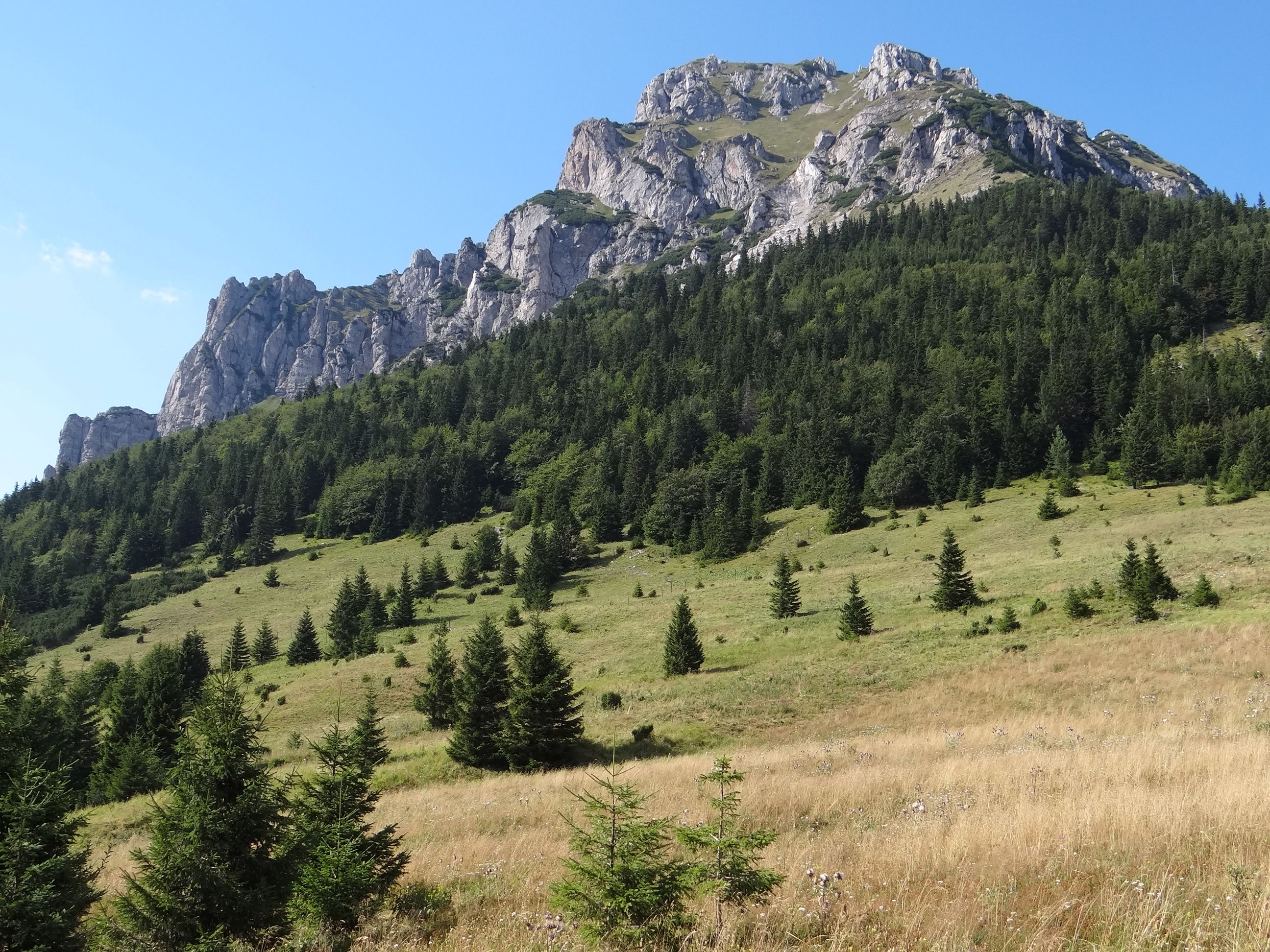 Veľký Rozsutec from Nedziholie